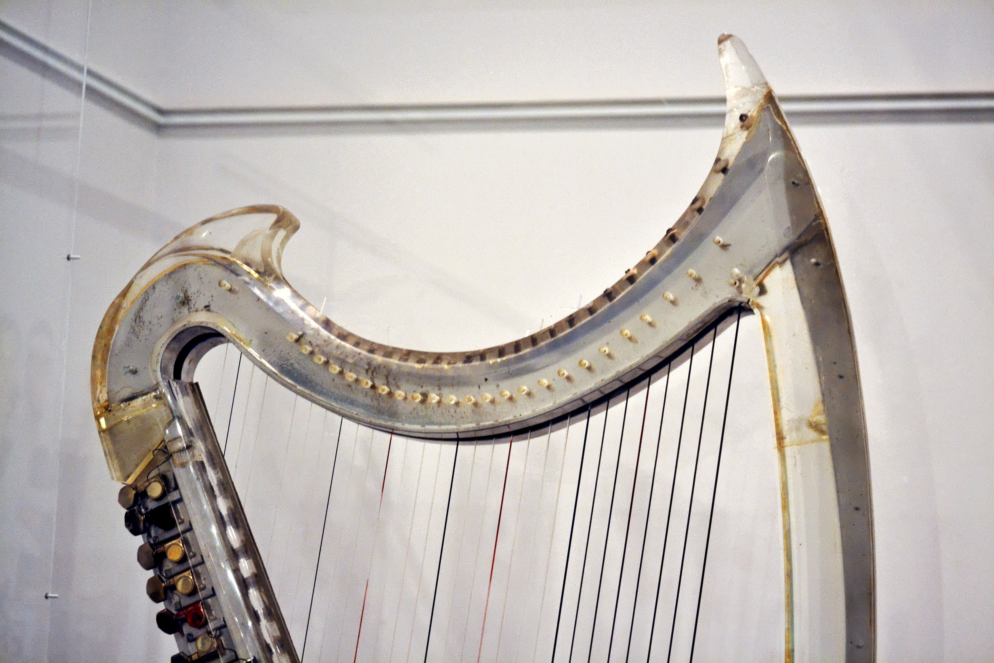 La Telenn Strink ("harpe de cristal" en plexiglas) conçue par Leo Goas-Straaijer entre 1986 et 1987 à partir d'un dessin d'Alan Stivell. Le harpiste l'utilise sur scène pendant une quinzaine d'années. Elle est exposée durant le mois de novembre 2015 à la médiathèque de Plérin-sur-mer (22) dans le cadre de l'exposition ROK par Frank Darcel (producteur de l'album Back to Breizh).